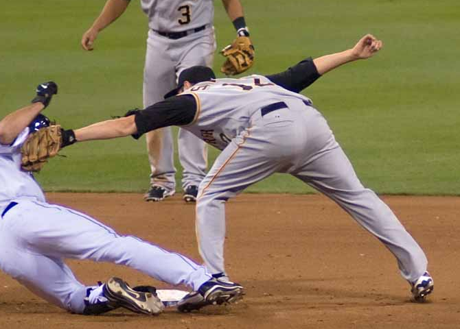 Freddy Sanchez